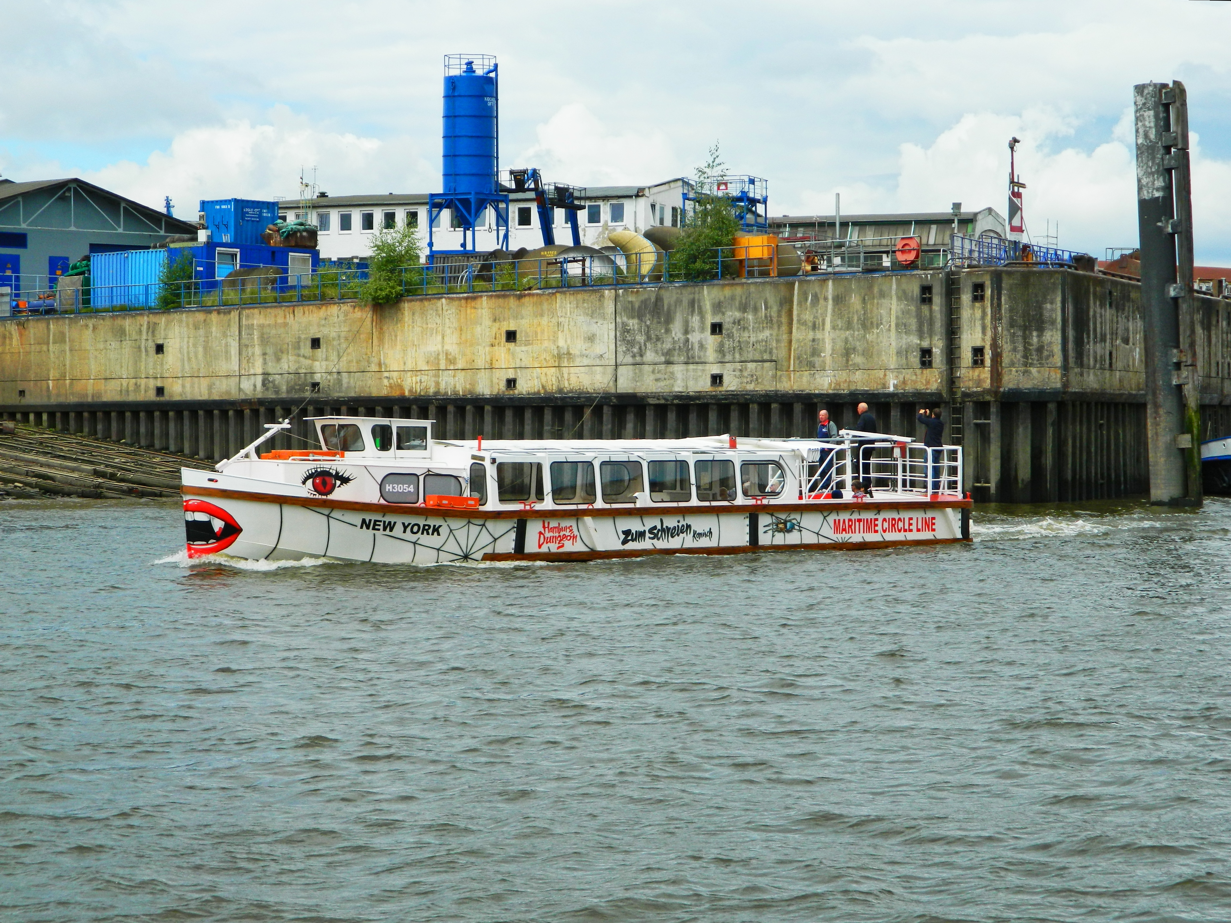 Steinwerder, Hamburg, Germany